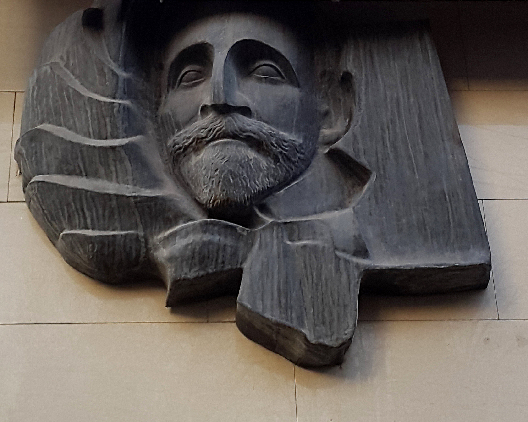 Հովհաննես Թումանյանի հուշաքարը Թումանյան-Աբովյան փողոցների անկյունում